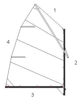 This picture is made by me by modifying Image:Optimist (dinghy).JPG Ett optimistsegels lik. Överlik Förlik (mastlik) Underlik (bomlik) Akterlik